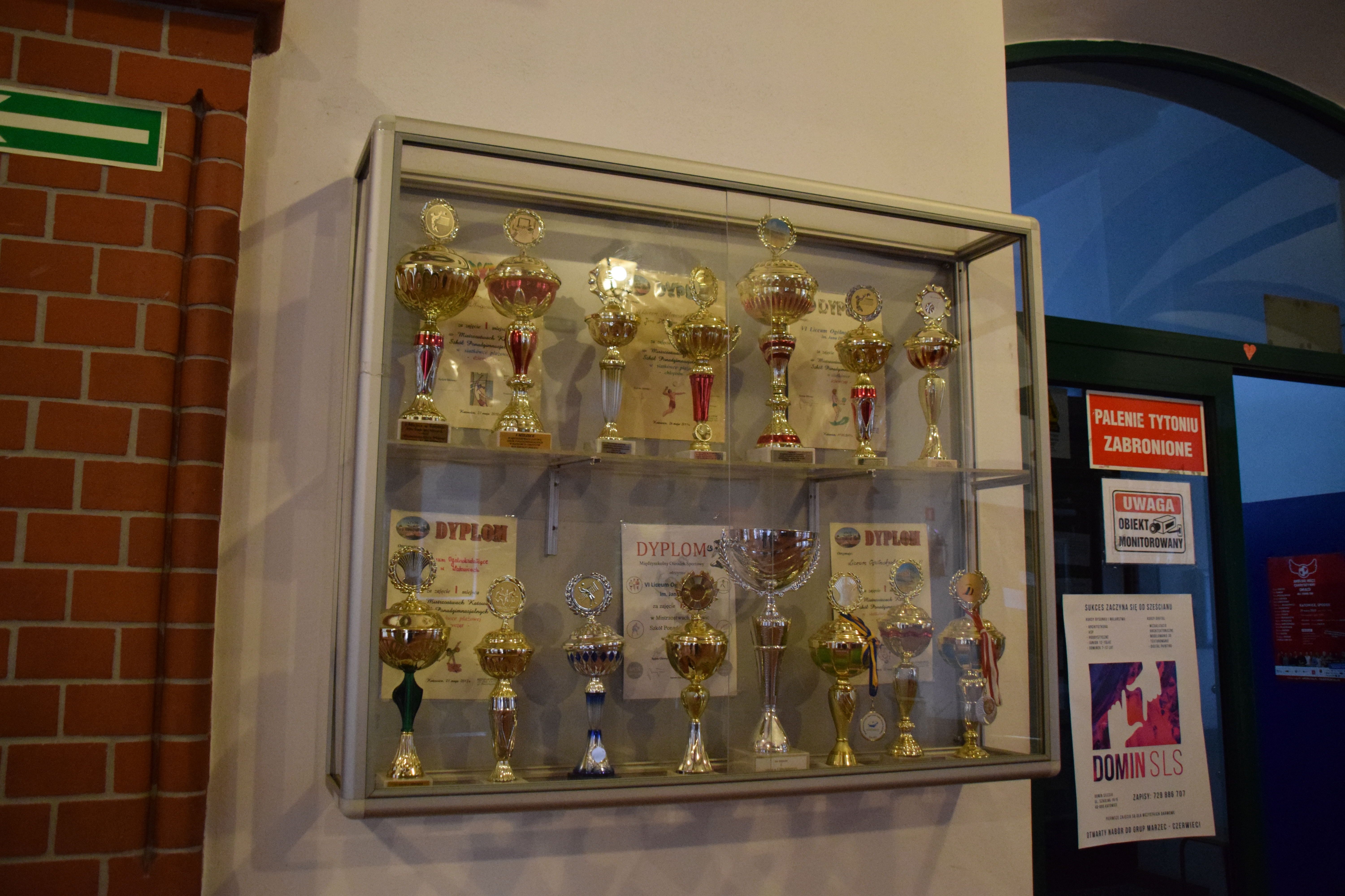 Część pucharów zdobytych przez VILO.